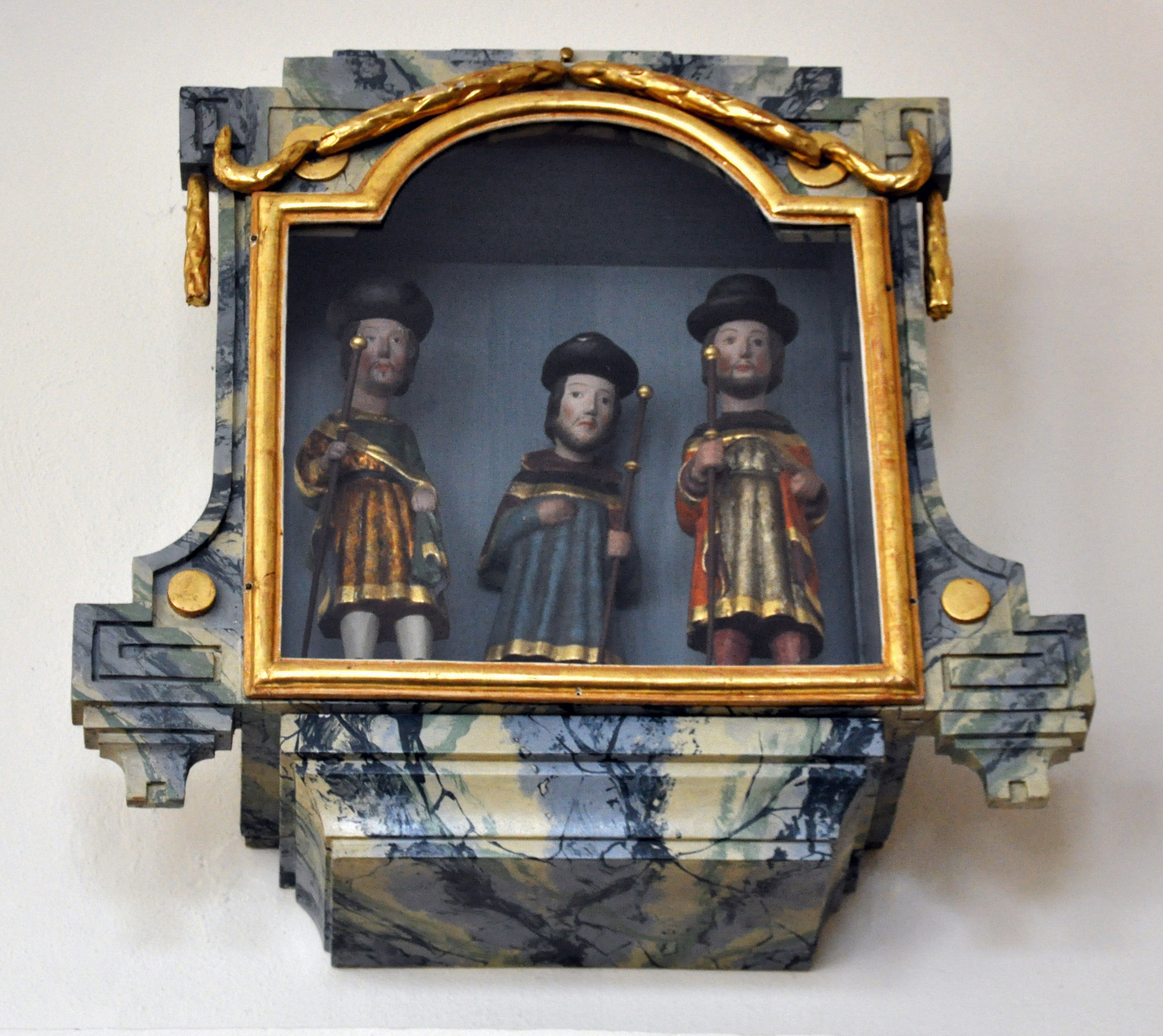 Kath. Pfarrkirche St. Alban, Hürbel (Gemeinde Gutenzell-Hürbel, Landkreis Biberach), Figurengruppe "Die drei Elenden" (St. Archus, St. Quartanus und St. Herenäus), vom früheren südlichen Seitenaltar, Holz, 15. Jahrhundert